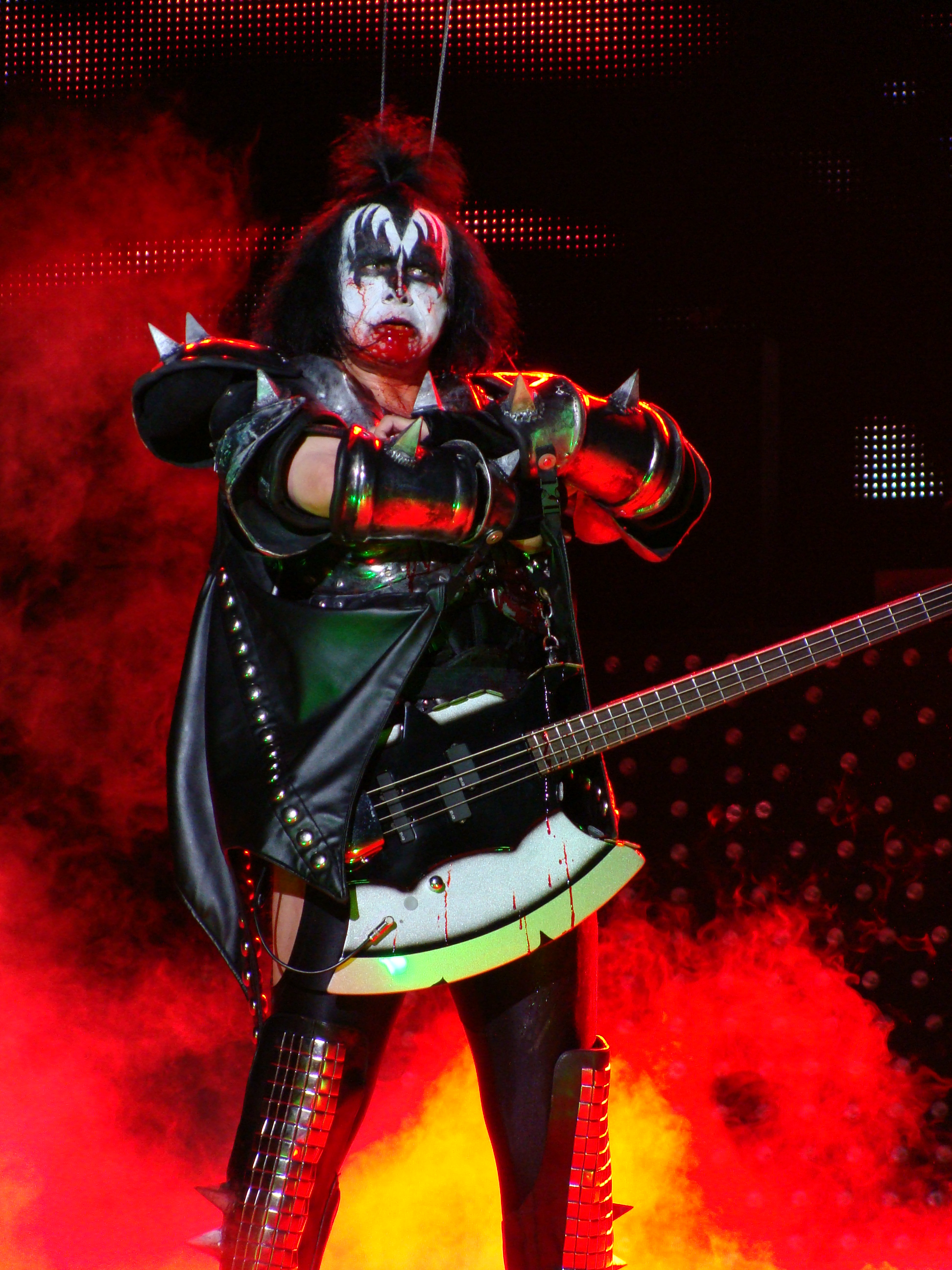 Gene Simmons, en una actuación del grupo KISS en Vitoria-Gasteiz, en el Azkena Rock Festival.